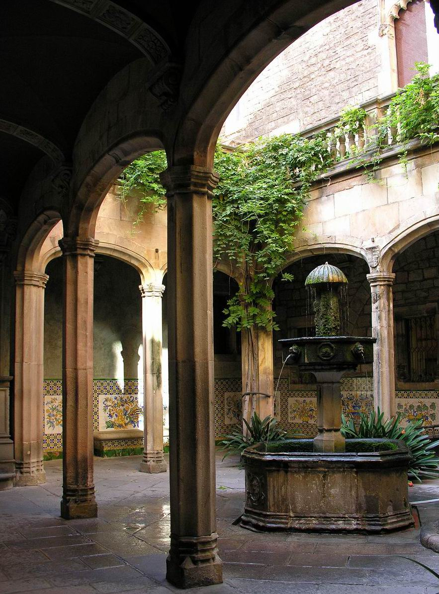 Pati de la Casa de l'Ardiaca, Barcelona